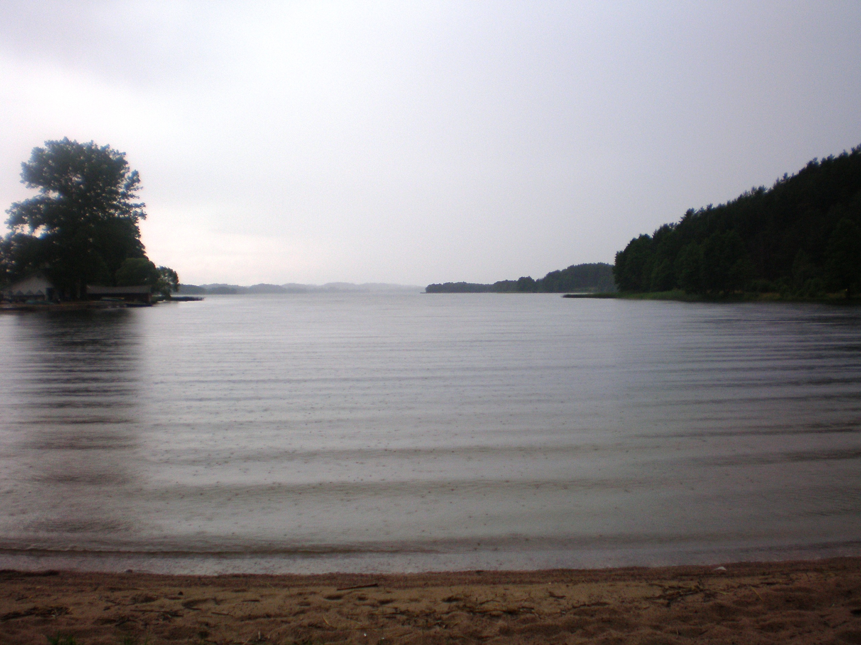 Lūšiai lake in heavy rain by Palūšė, Lithuania